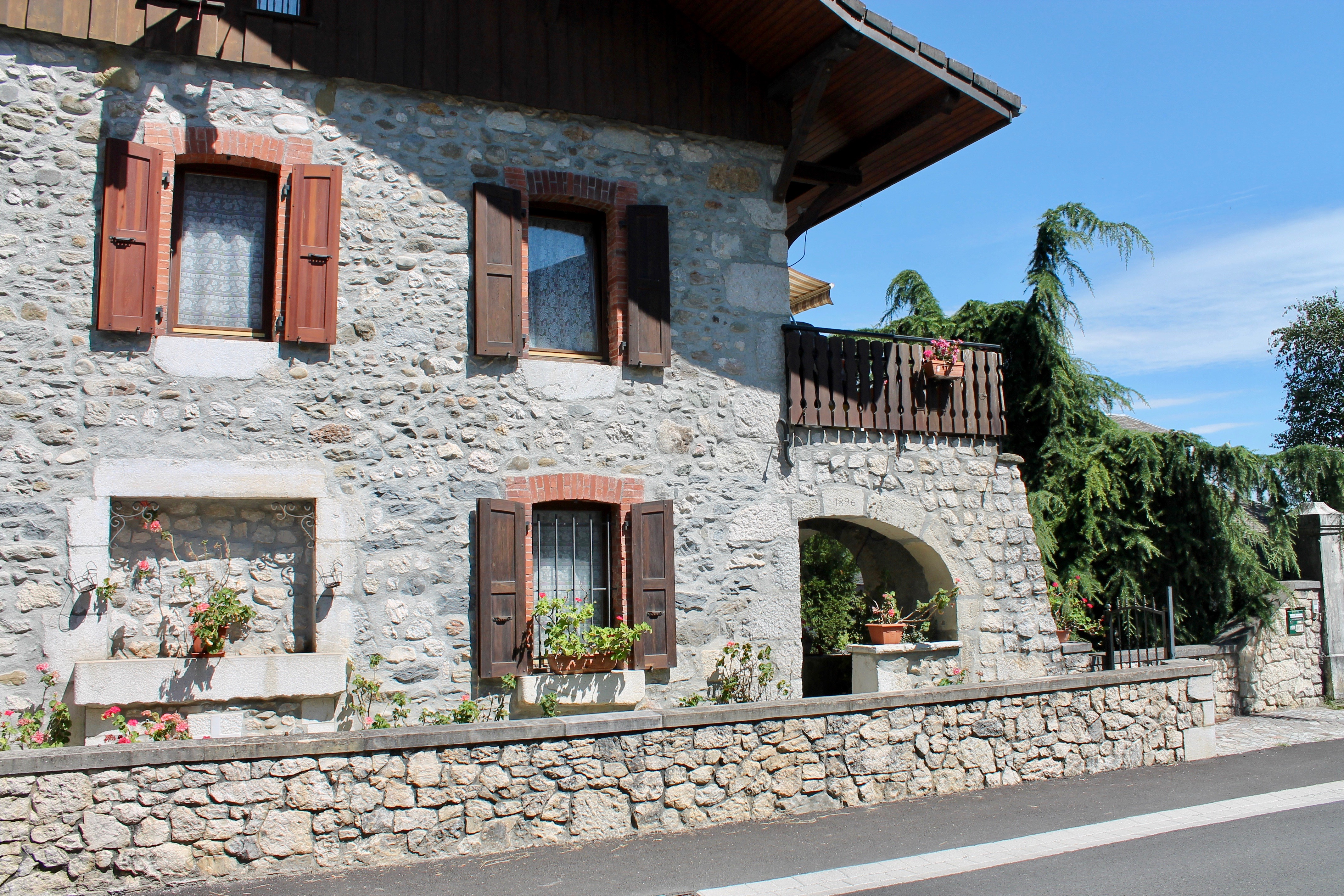 Maison rénovée, de 1896, située au chef-lieu de Vaulx (Haute-Savoie)